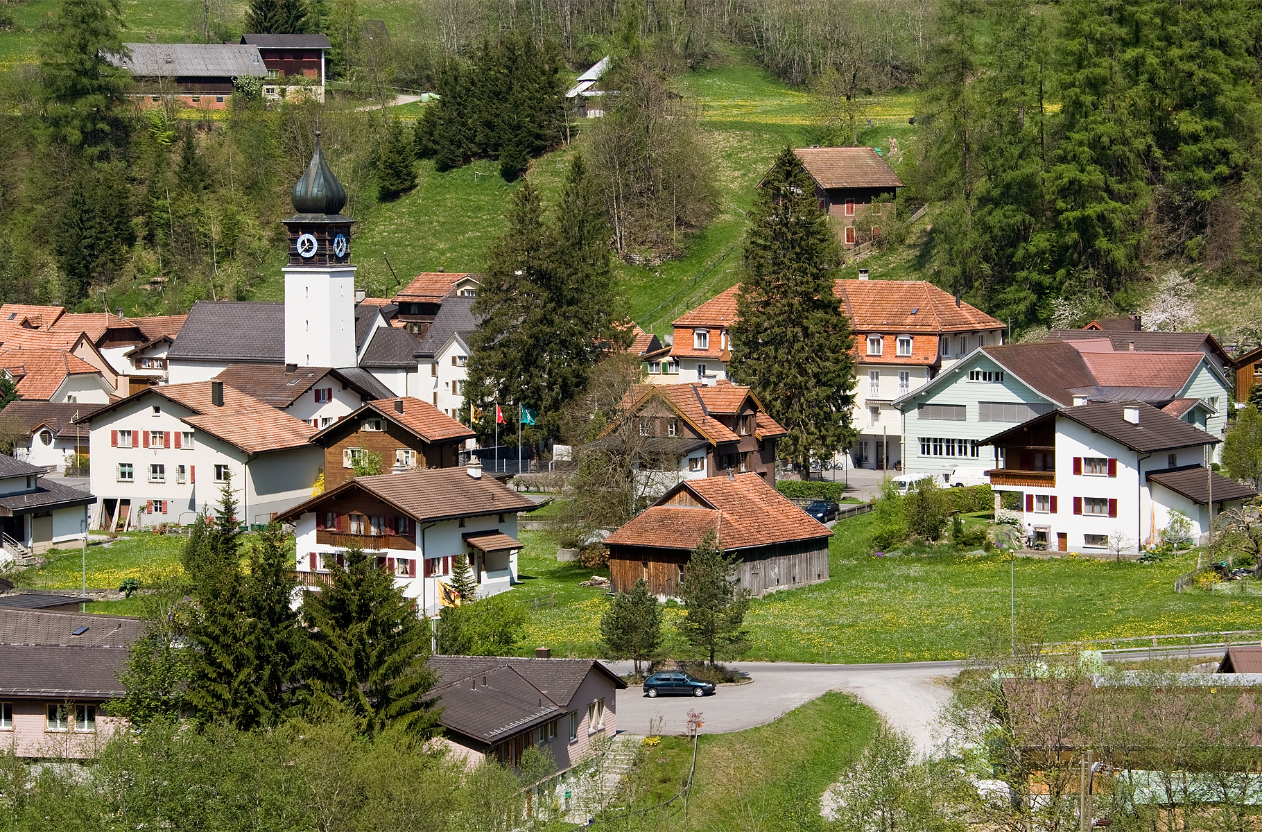 Vättis